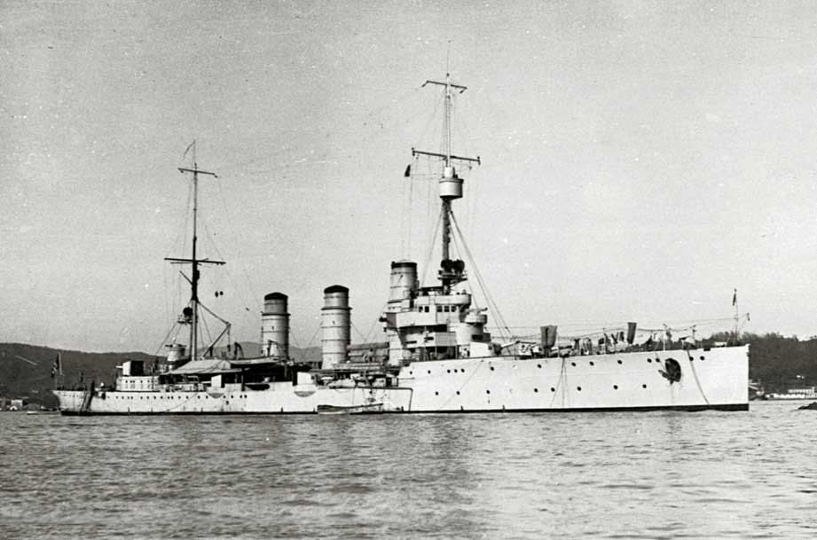 L’incrociatore leggero Bari.